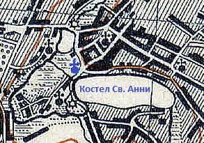 Карта Полонного